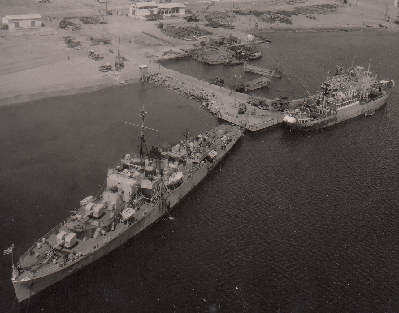 מבט מהאוויר על נמל אילת 1957 עם פריגטה ואנית סוחר